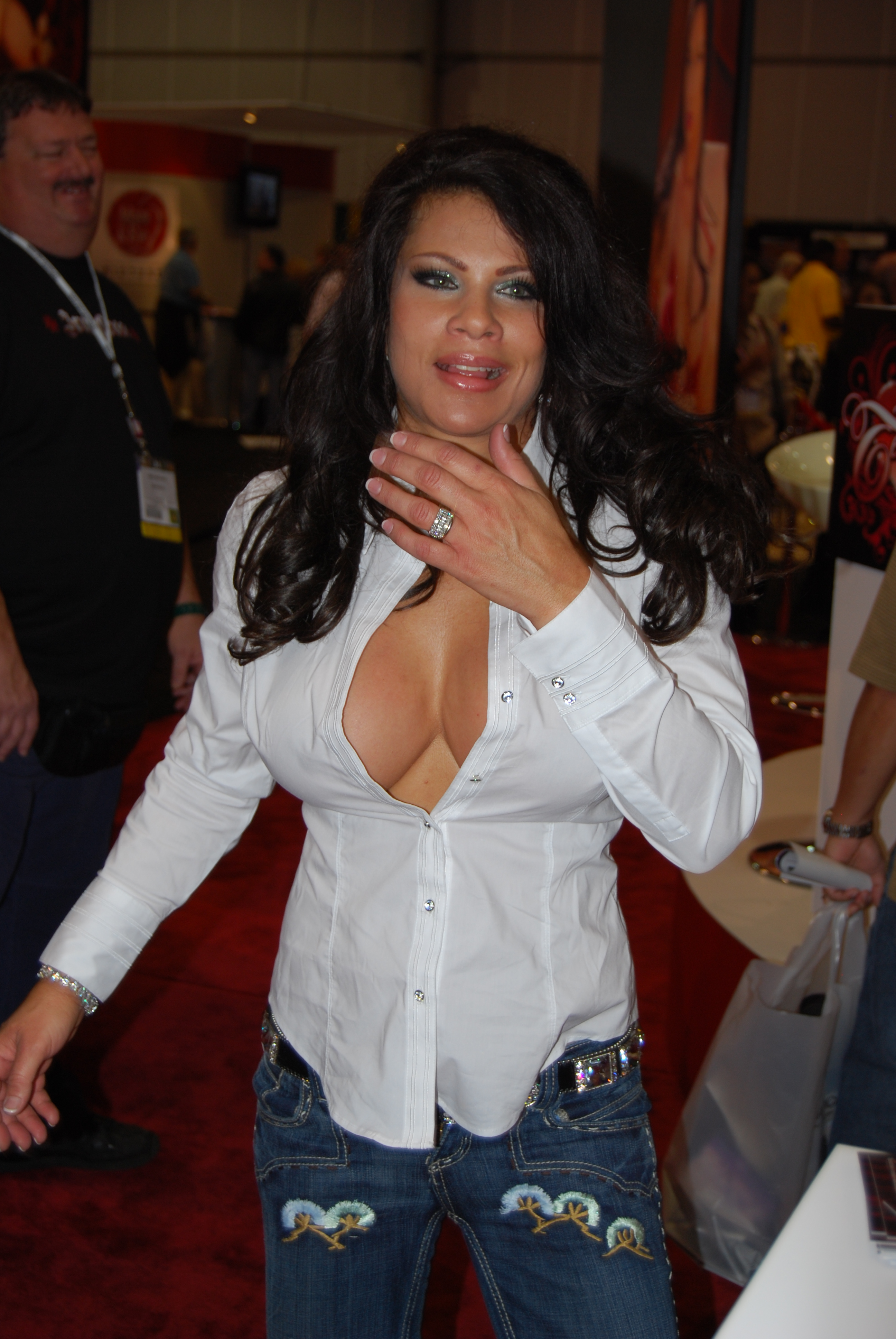 AEE2008_Nikon_Day1 151